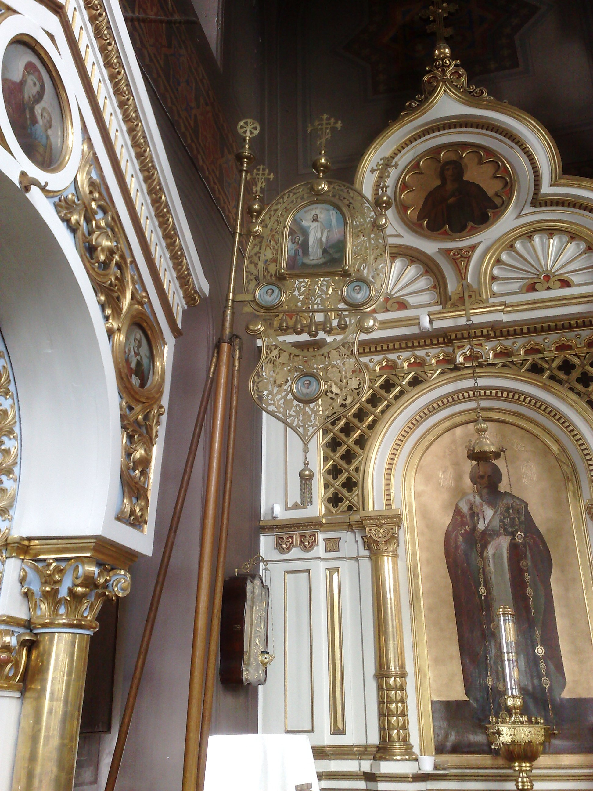 Metallinen kirkkolippu Uspenskin katedraalissa